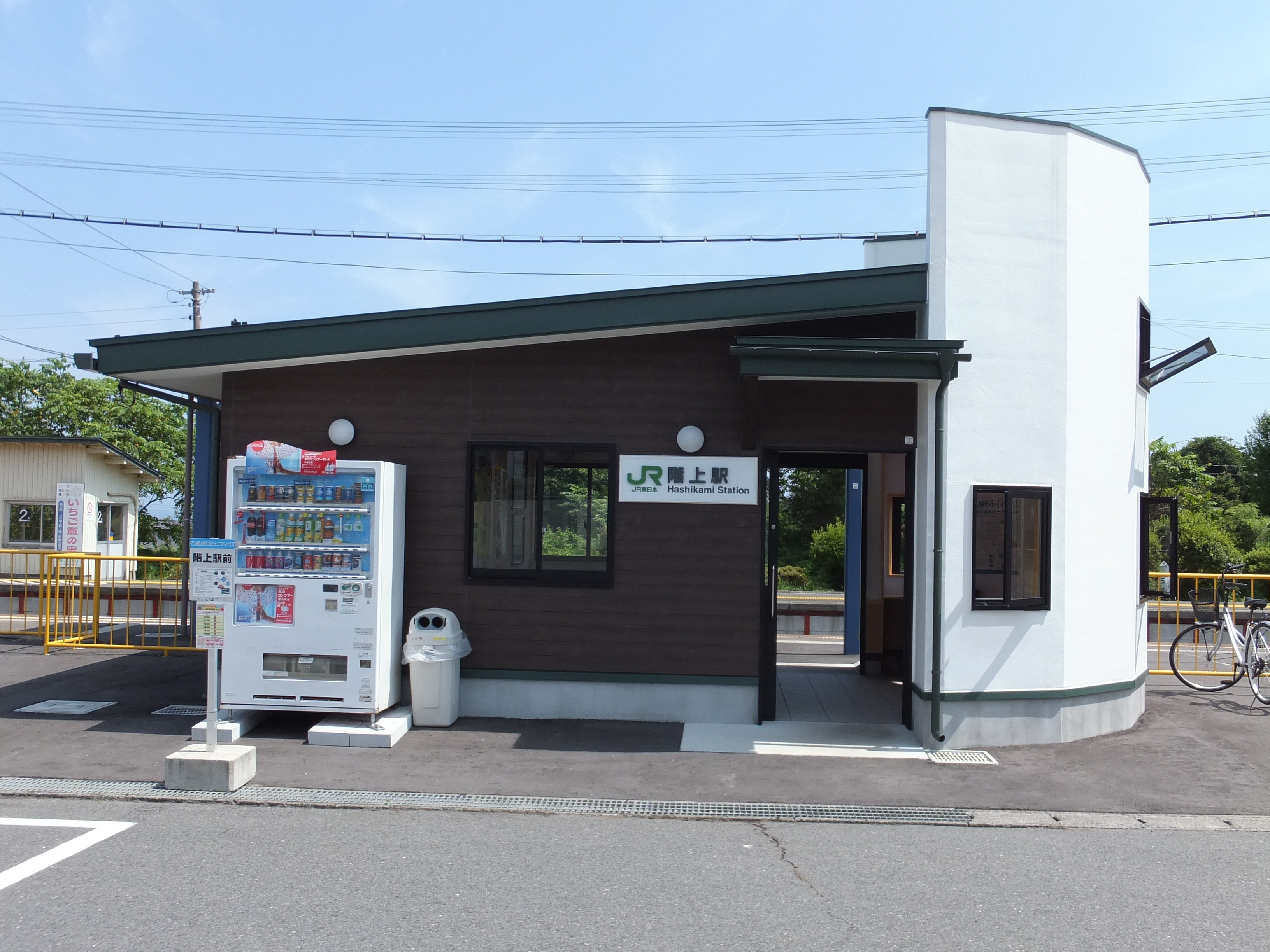 JR東日本・八戸線階上駅